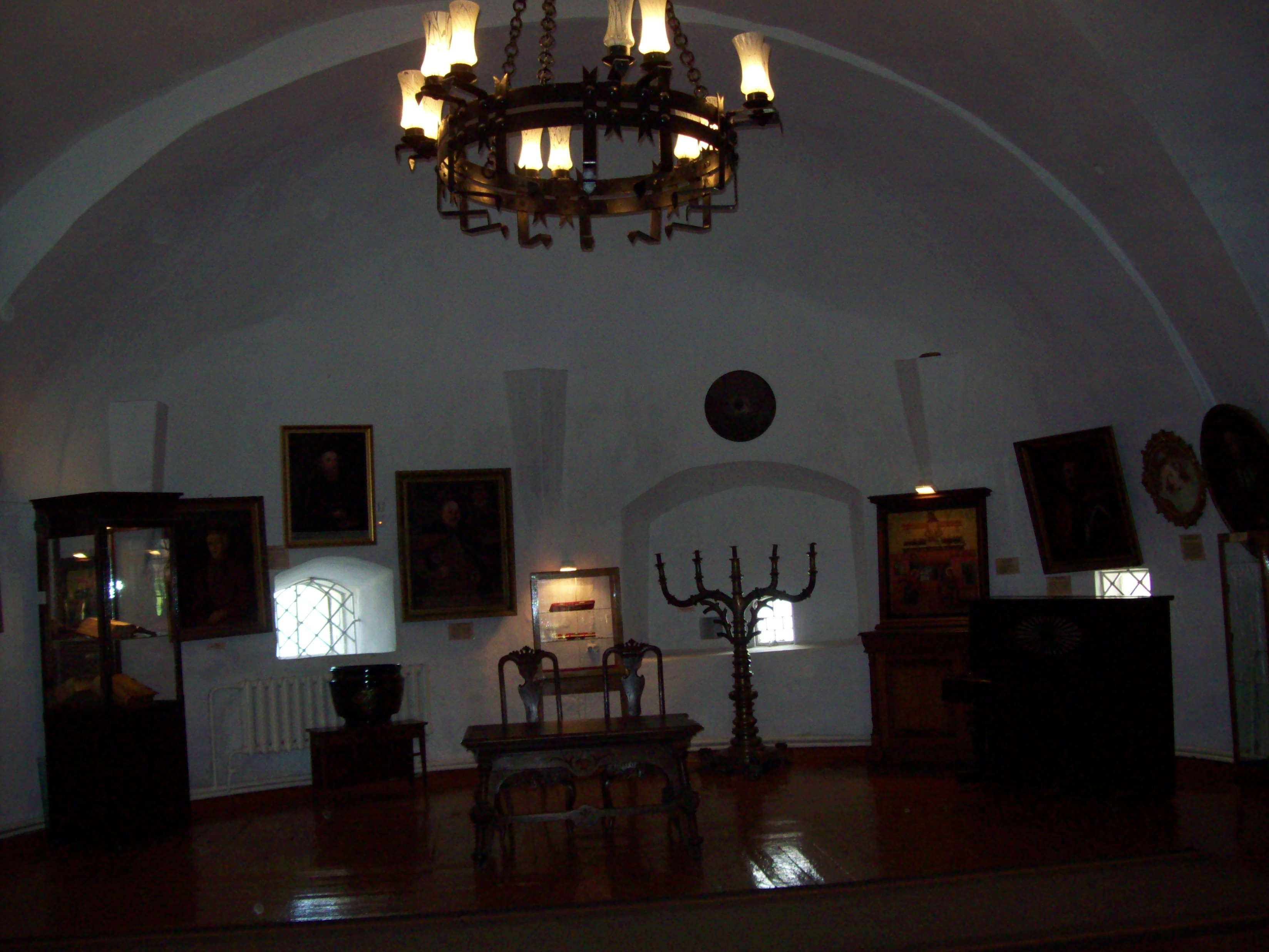 Знято фотоапаратом Kodak